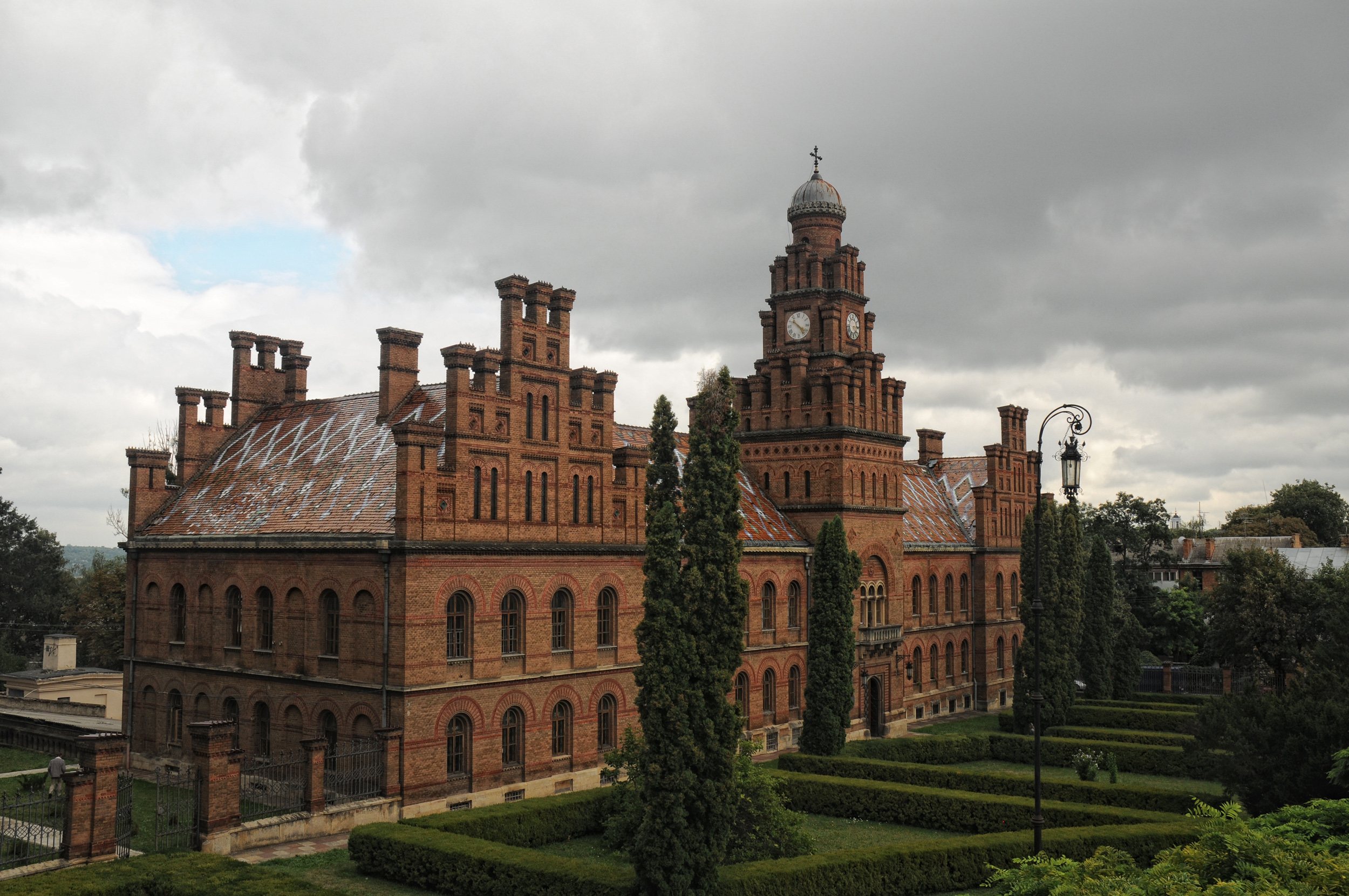 Резиденція буковинських митрополитів, Монастирський корпус